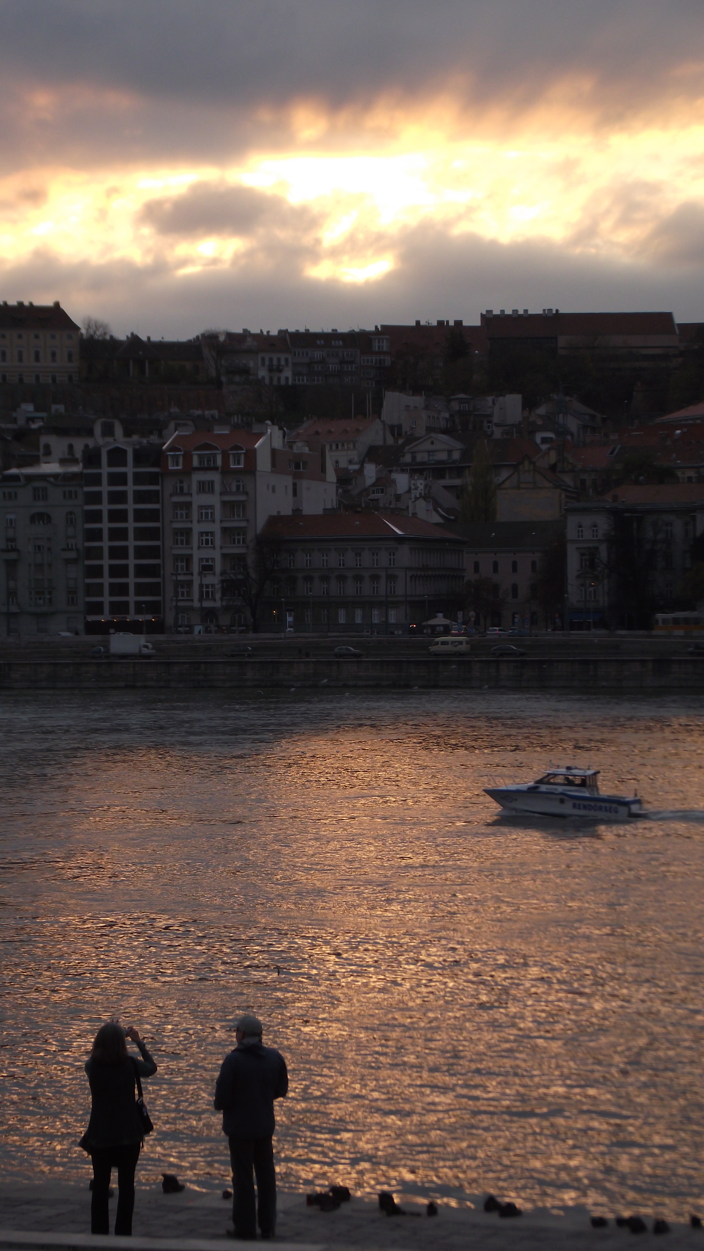 Duna-part naplementekor a pesti oldalról.